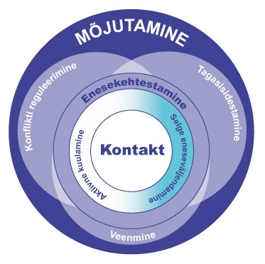 Baasilise suhtlusoskuse - selge eneseväljendamise - seosed ja asukoht teiste suhtlusoskuste hulgas